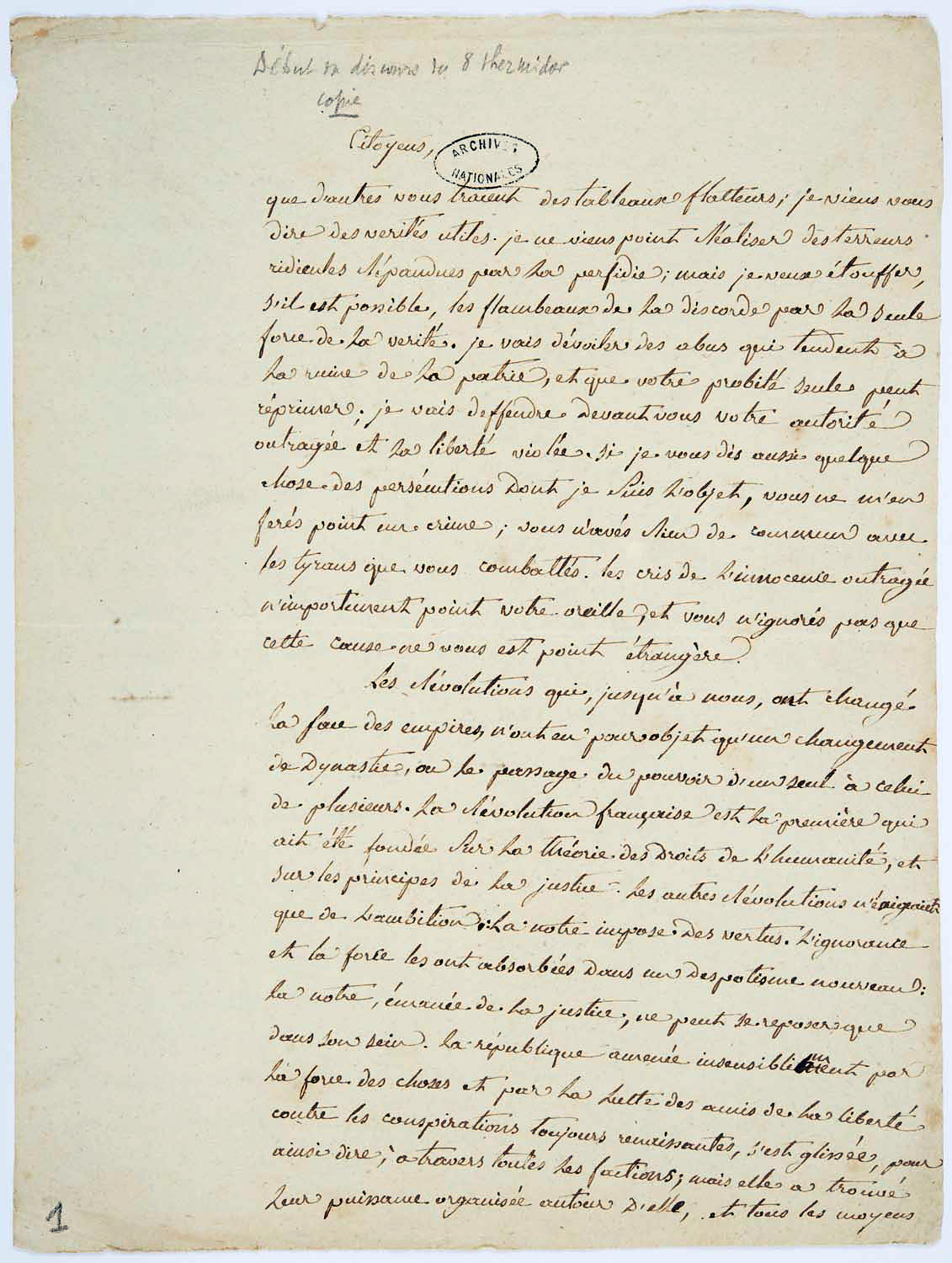 Le dernier discours de Robespierre. Discours du 8 thermidor an II (26 juillet 1794), fragment.